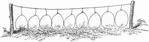 Oka chytací